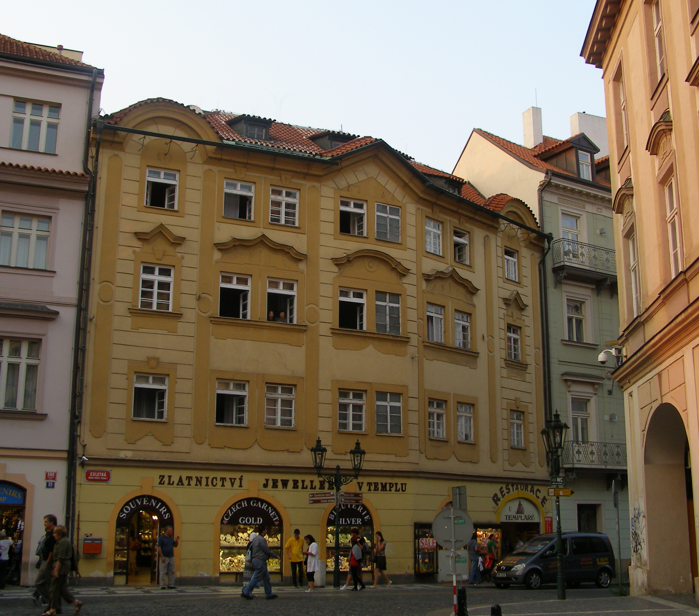 Městský dům V Templu (Staré Město), Praha 1, Celetná 589/27, Staré Město